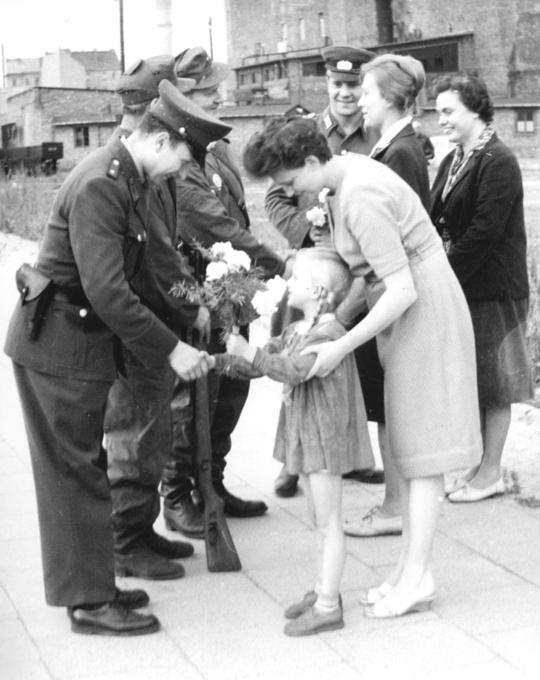 ADN-ZB-Heidkamp-15.8.1961-Die Berliner Bevölkerung fühlt sich mit den bewaffneten Kräften eng verbunden, die zur Sicherung des Friedens in der Hauptstadt der DDR ihren Dienst tun. Am Kontrollpunkt Heinrich-Heine-Straße werden Blumen und kleine Geschenke übergeben. Veröffentlichung nur mit Genehmigung der Pressestelle des MDI